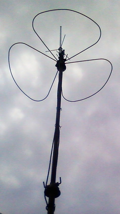 Antenne Big wheel 144 MHz et antenne verticale bibandes 144 MHz et 432 MHz